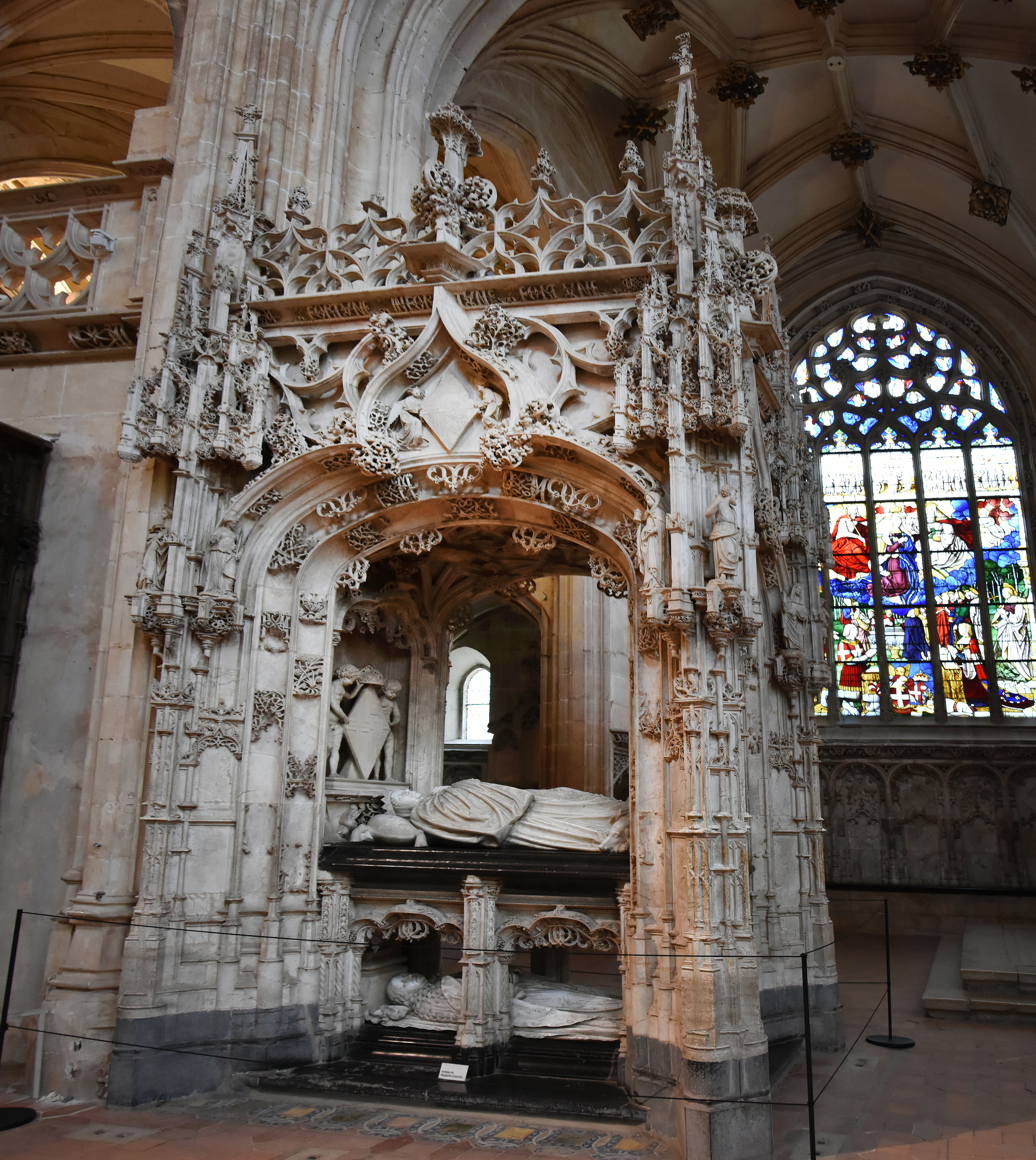 Grafmonument van Margaretha van Oostenrijk (1480-1530) - Koninklijk klooster van Brou, door Conrad Meit en een Brabants atelier naar tekeningen van Jean van Roome